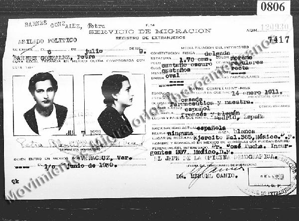 Digitalización desde una copia de microfilm del Archivo General de la Nación de México. Registro de Inmigrantes Españoles en México. Archivo General de la Administración